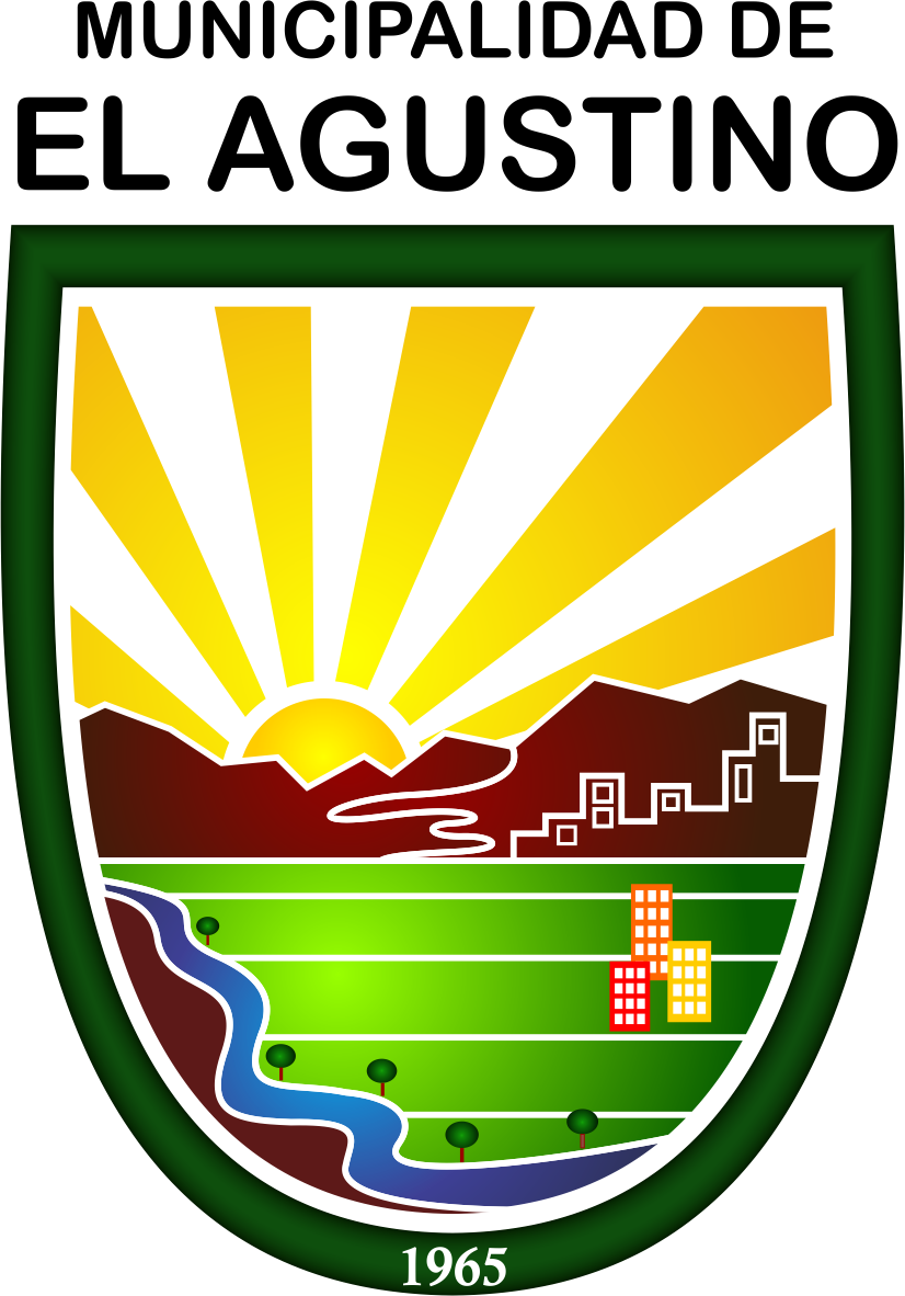 Distrito del Agustino - Provincia de Lima - Región Lima